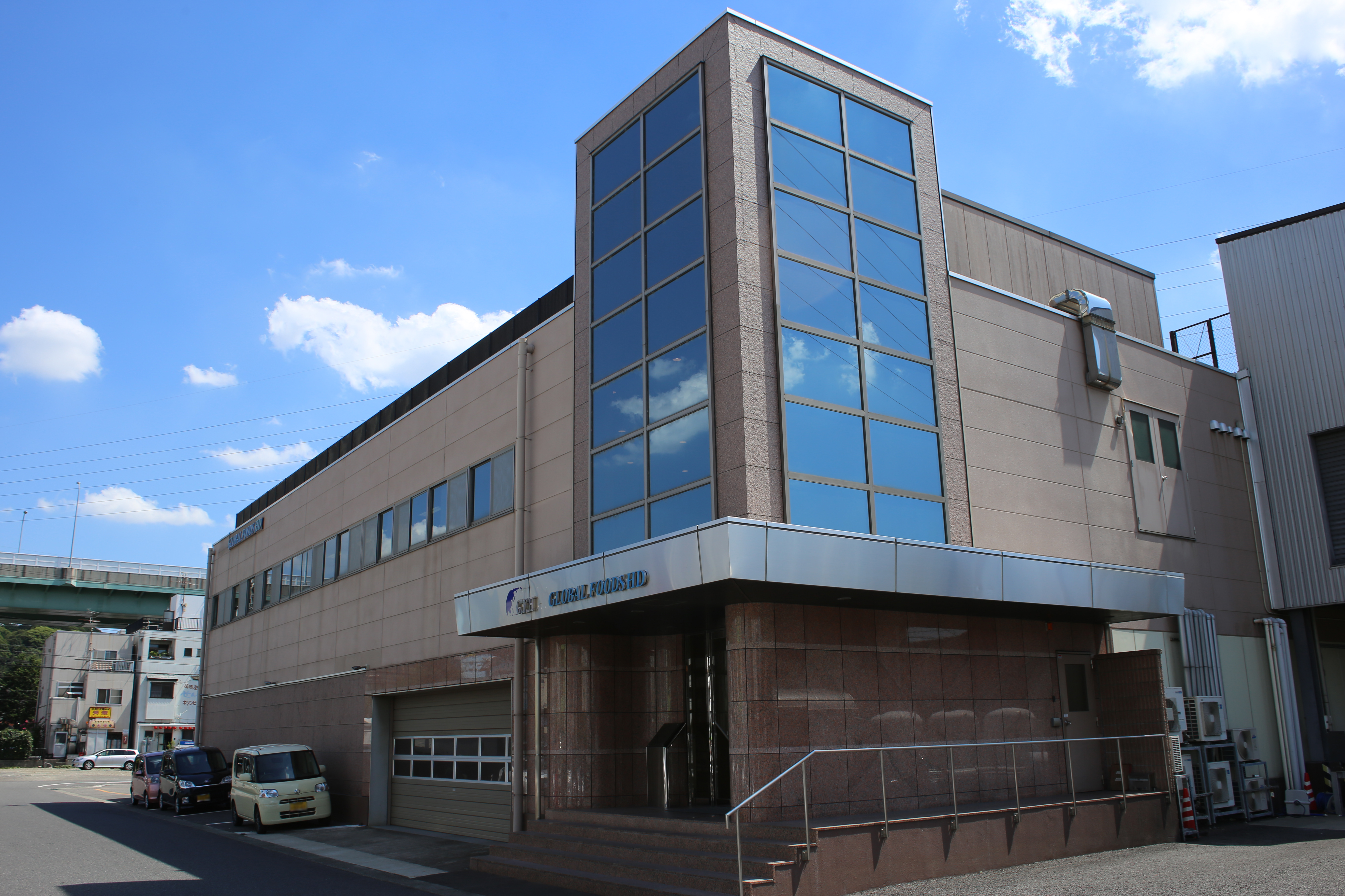 愛知県小牧市の藤一番本社